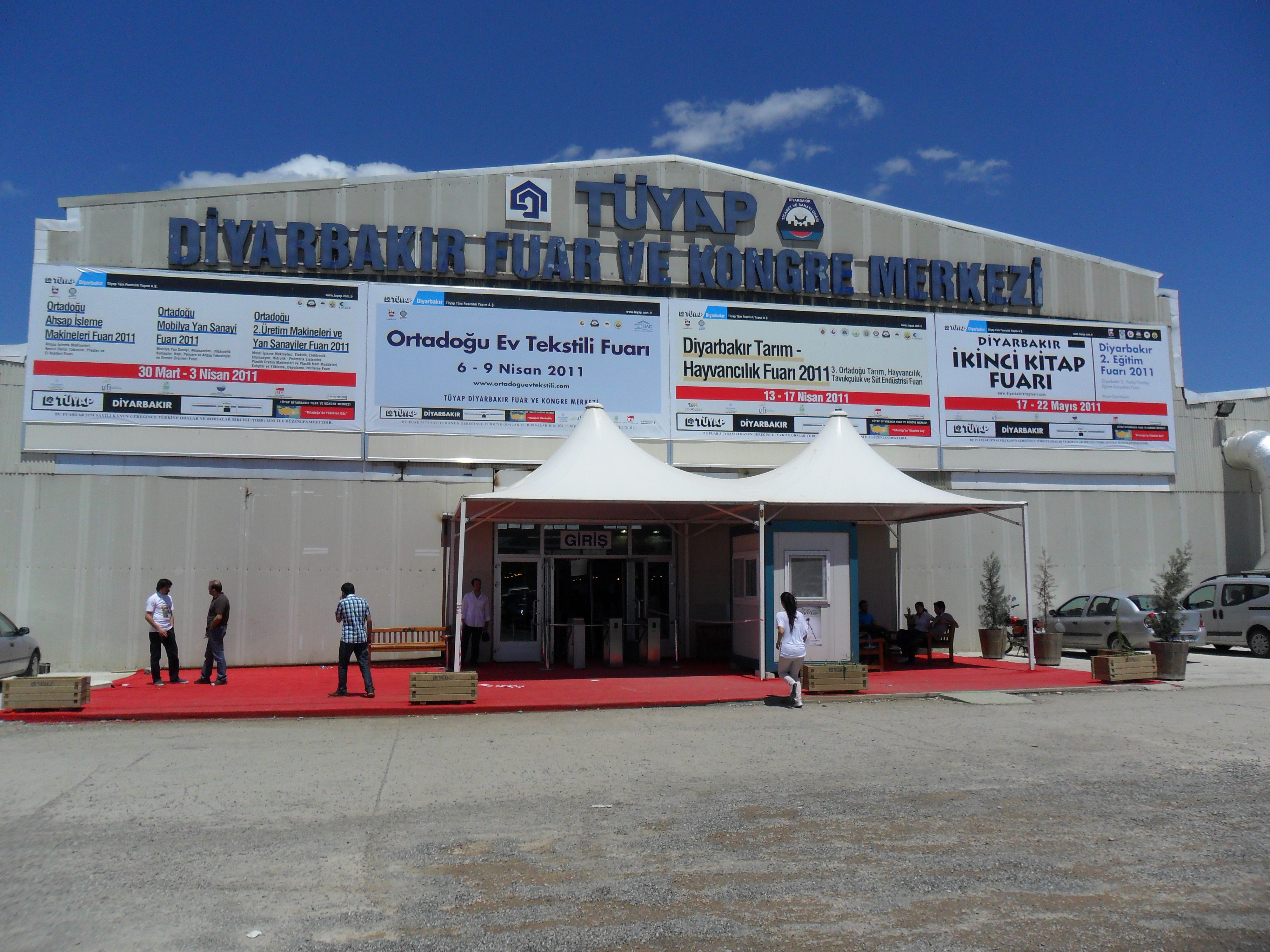 TÜYAP Diyarbakır Fuar ve Kongre Merkezi'nin girişi